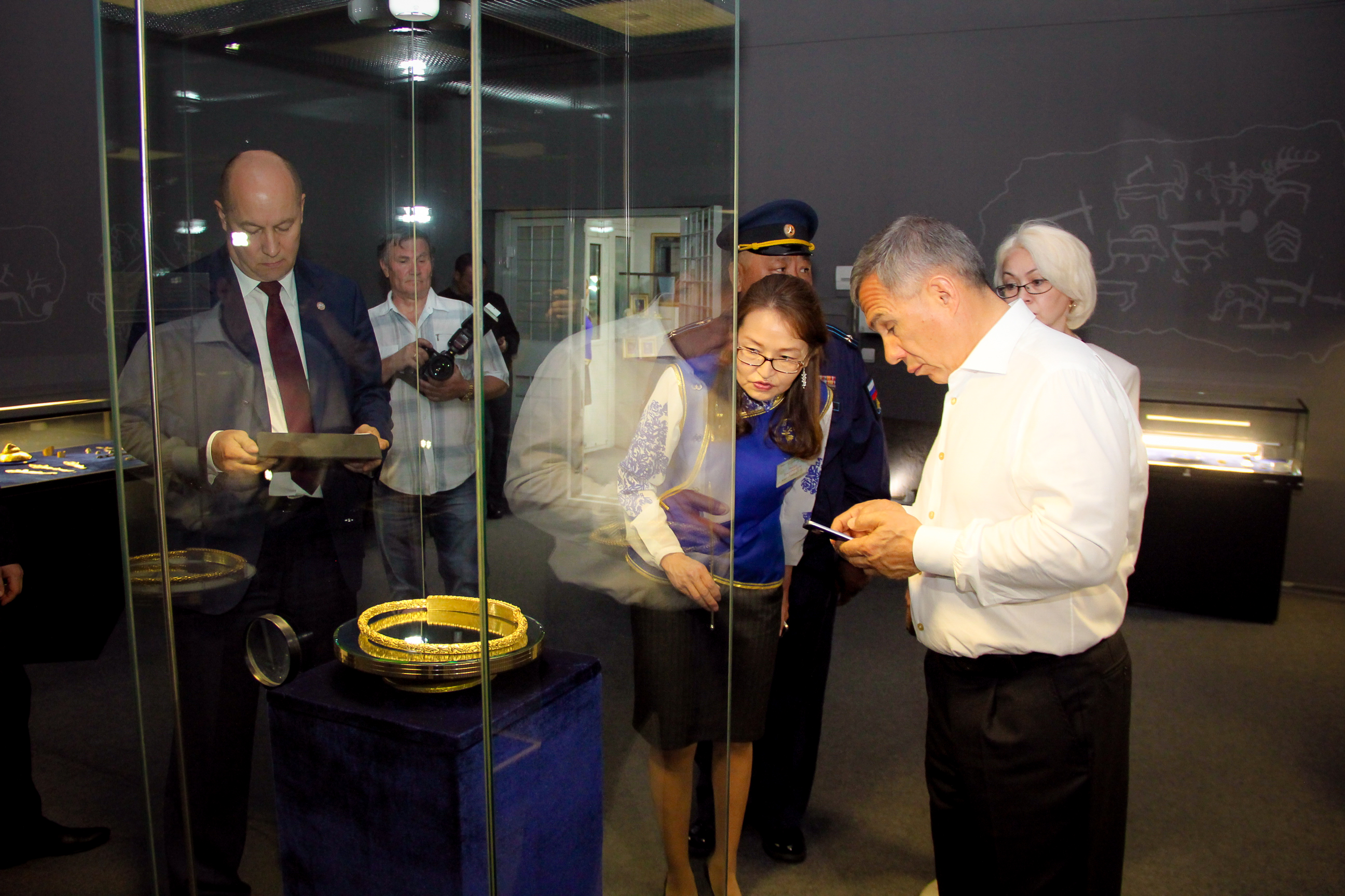 Визит делегации Республики Татарстан